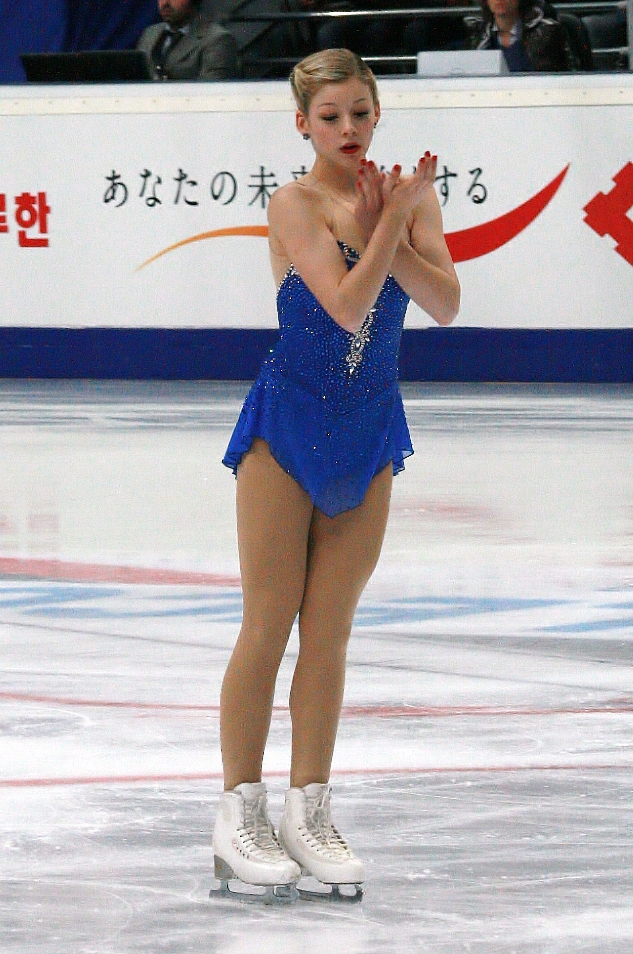 Грейси Голд (США) на Кубке Ростелекома 2012. Произвольная программа.